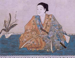 Yoshitoshi Shiba